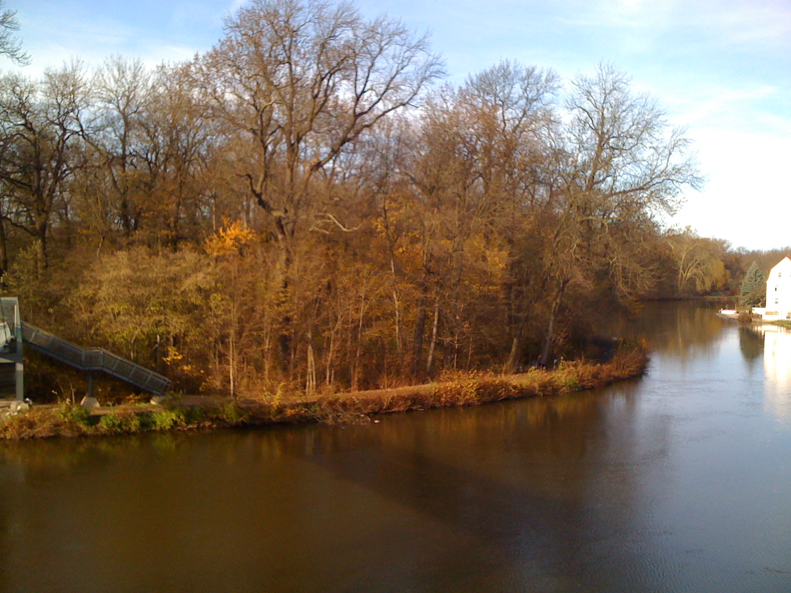 Rabeninsel in Halle (Saale) vom Böllberger Ufer auf Höhe der Rabeninselbrücke aus gesehen